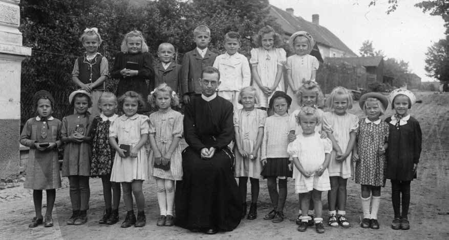 Katecheze